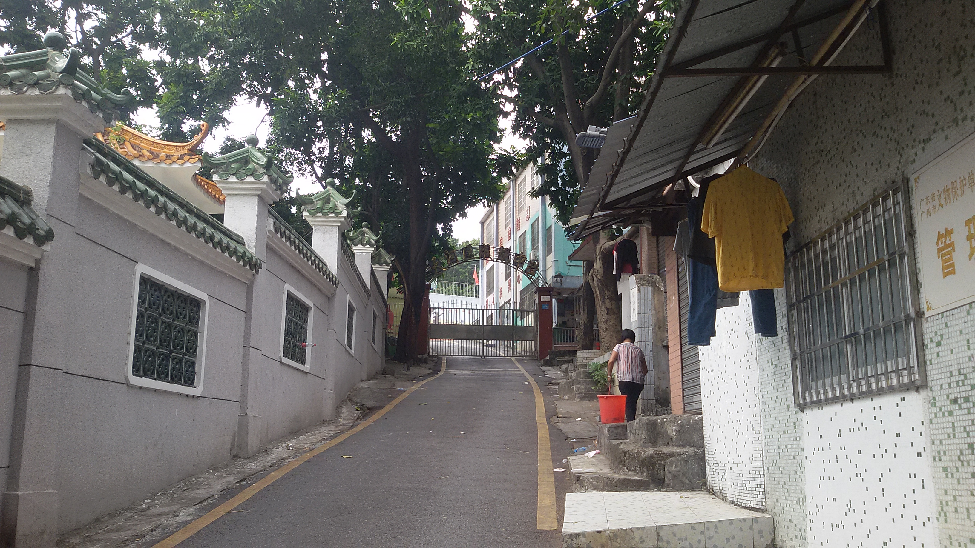 粵語: 天河區成龍學校